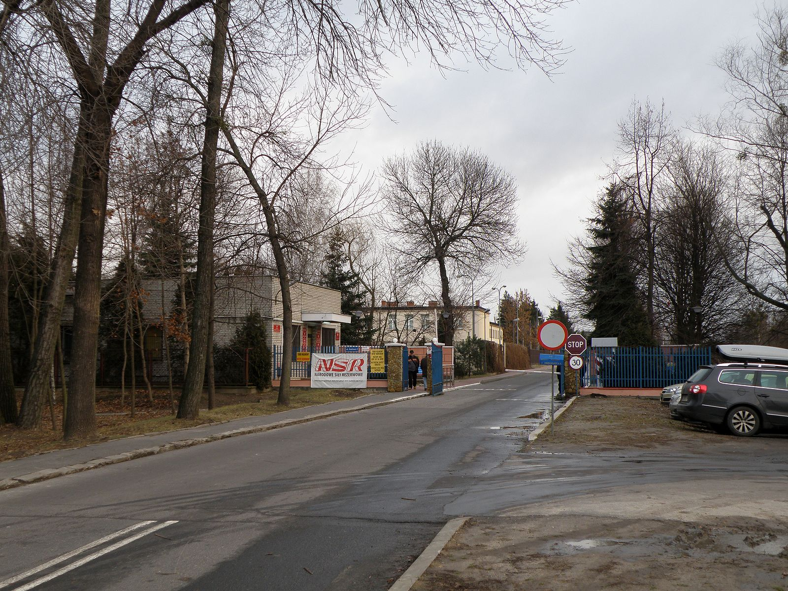 Radiowa 2, brama do wojskowego kompleksu przy Lotnisku Babice